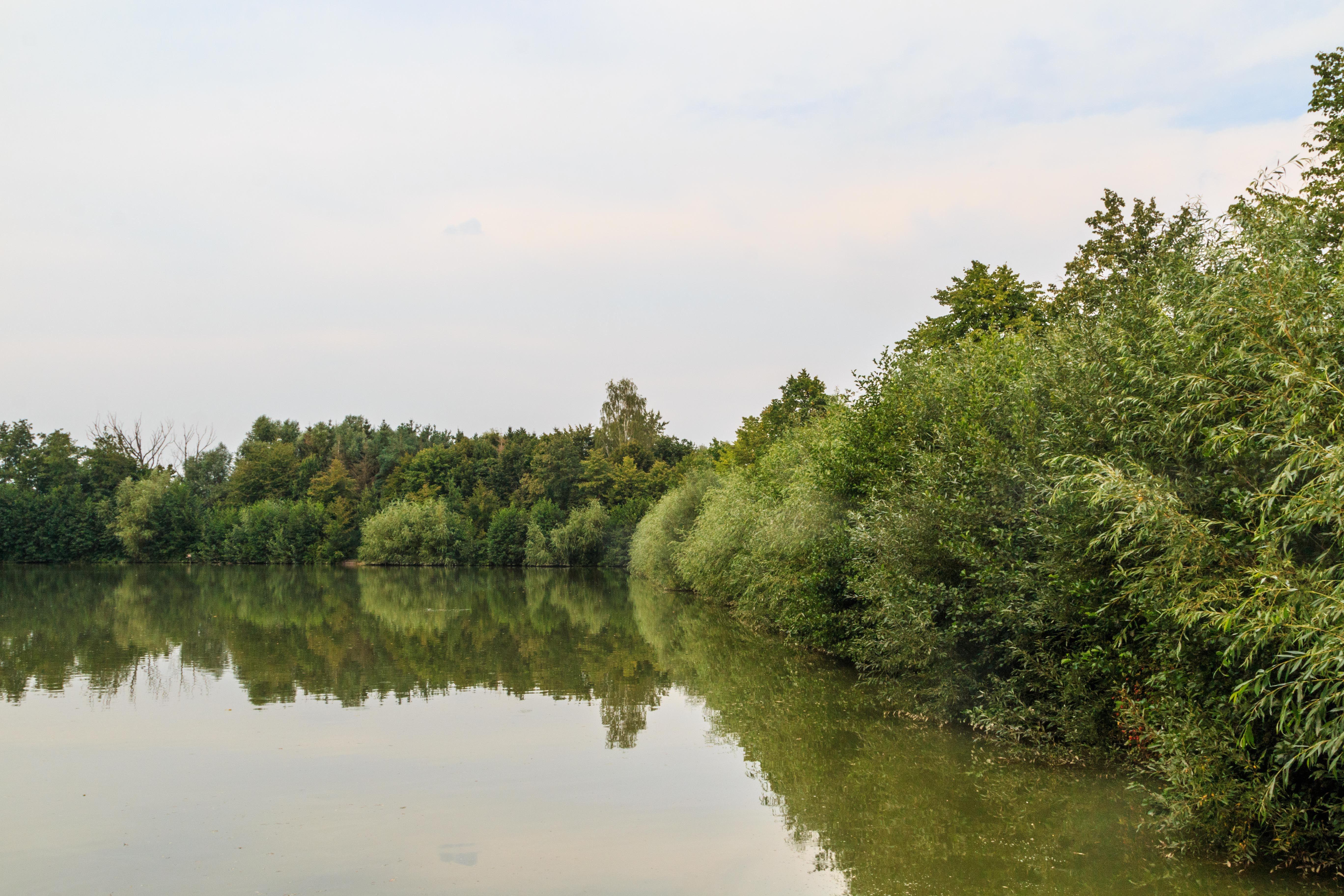 Rybník Čičánek